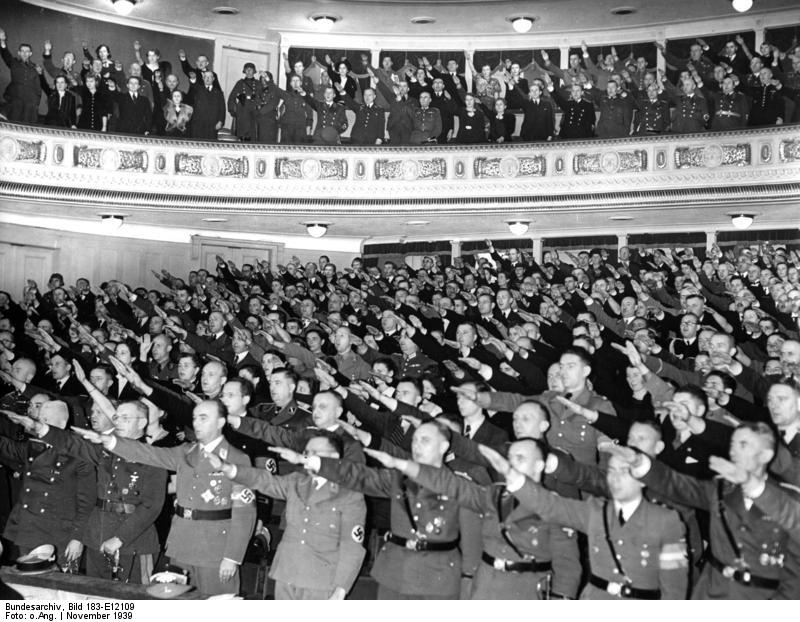 Posen, Stadttheater, NS-Feierstunde Erste Nationalsozialistische Stunde im befreiten Posen. Am Freitag fand im Posener Stadttheater die erste nationalsozialistische Feierstunde statt, der als Ehrengäste die Hinterbliebenen der von den Polen ermordeten Volksdeutschen beiwohnten. U.B.z.: Blick in die Versammlung während der Nationalen Lieder. Man sieht von links: Ministerialdirektor Dr. Jaeger, General der Artillerie Petzel, Reichsstatthalter Greiser. Fot. Ho. 4.11.39 12957-39 Abgebildete Personen: Greiser, Arthur: Senatspräsident von Danzig, Gauleiter Warthegau, Deutschland Petzel, Walter: General der Artillerie, Heer, Deutschland